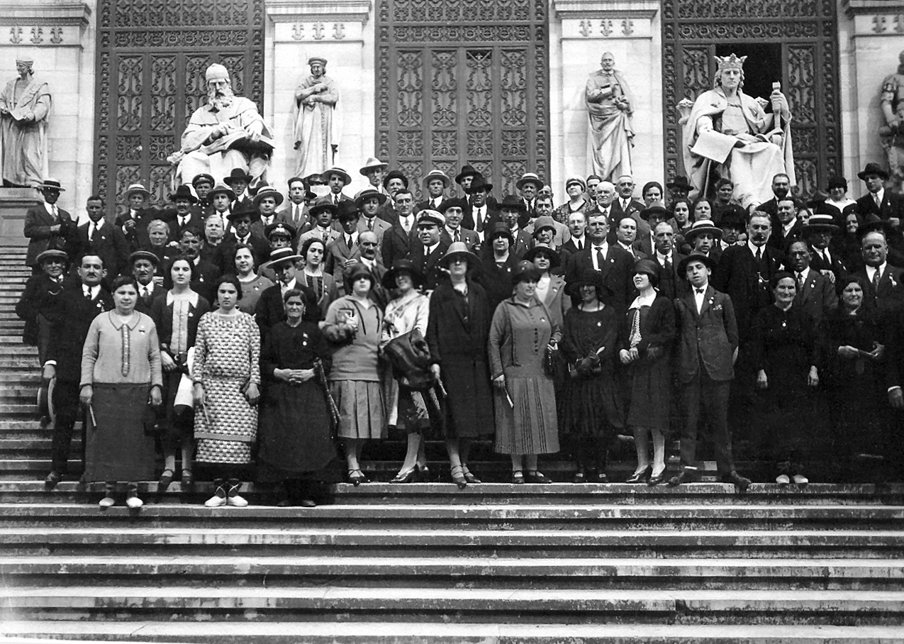 6-a Hispana Esperanto-Kongreso, Madrido 1926